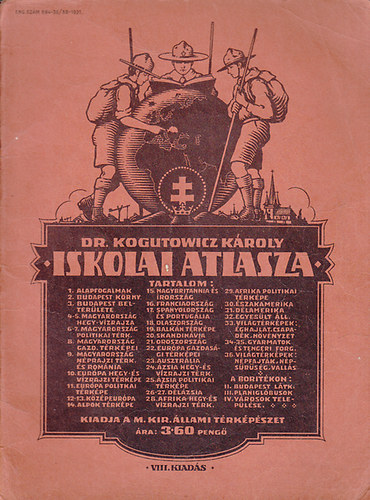 Kogutovicz Károly iskolai atlaszának borítóképe, Magy.Kir.Állami Térkép.Int.,1931.